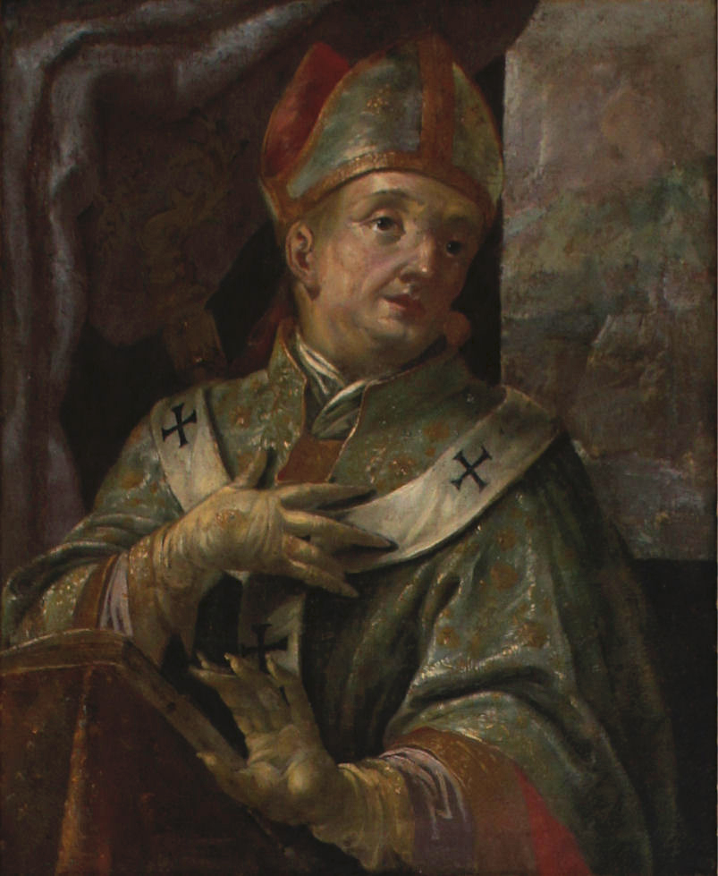 Porträtgemälde von Arbeo, Bischof von Freising, im Fürstengang zwischen Fürstbischöflicher Residenz und Freisinger Dom.